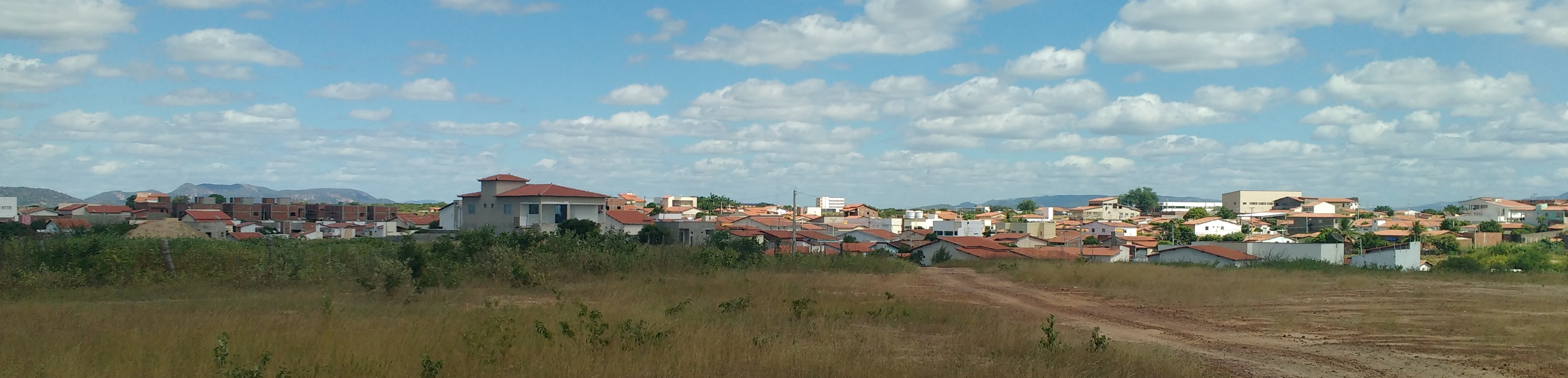 Panorama do bairro Chico Cajá em Pau dos Ferros, Rio Grande do Norte (Brasil).